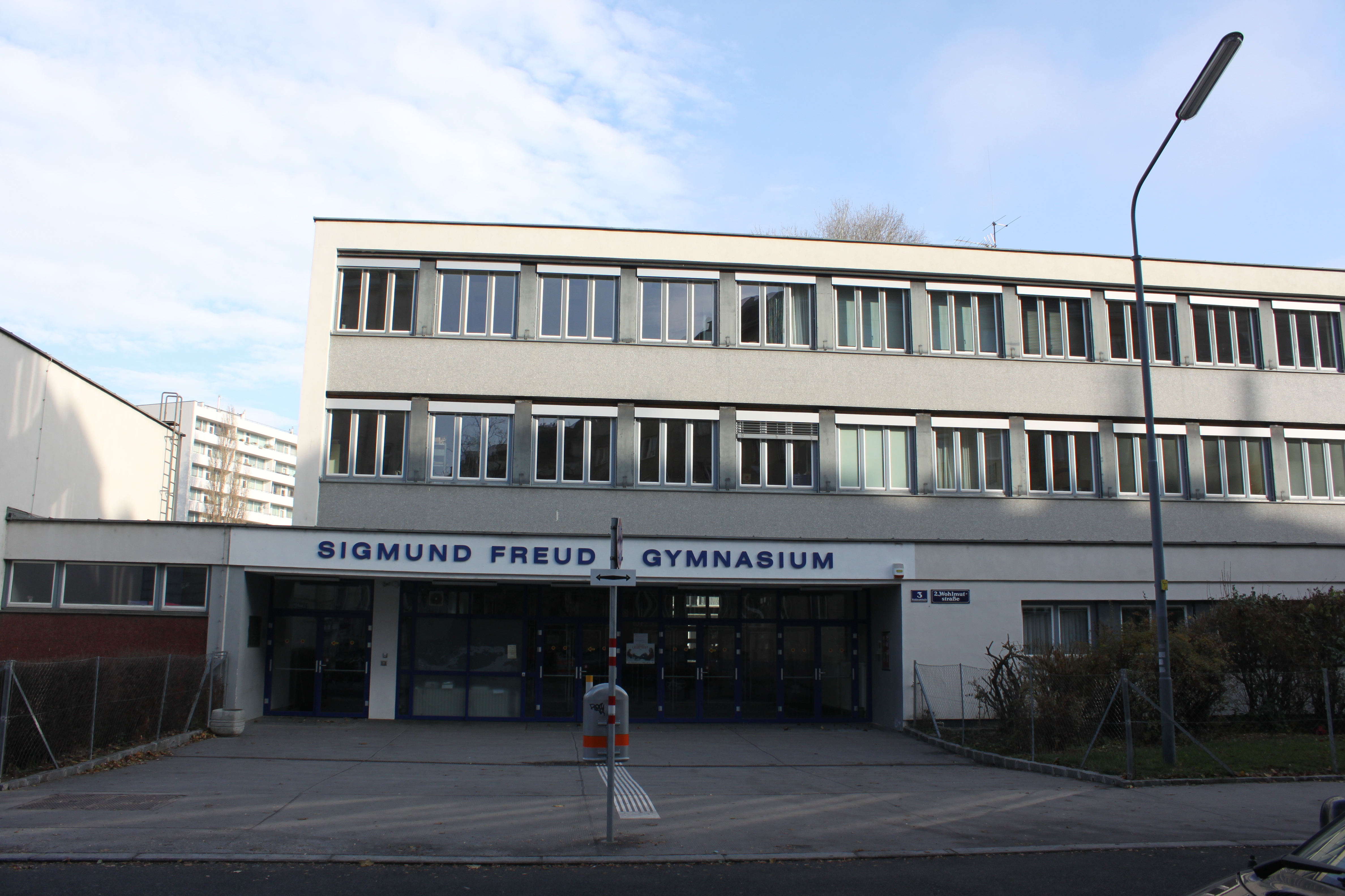 Sigmund-Freud-Gymnasium, Wohlmutstraße 3, Wien Leopoldstadt, erbaut 1964 bis 1968